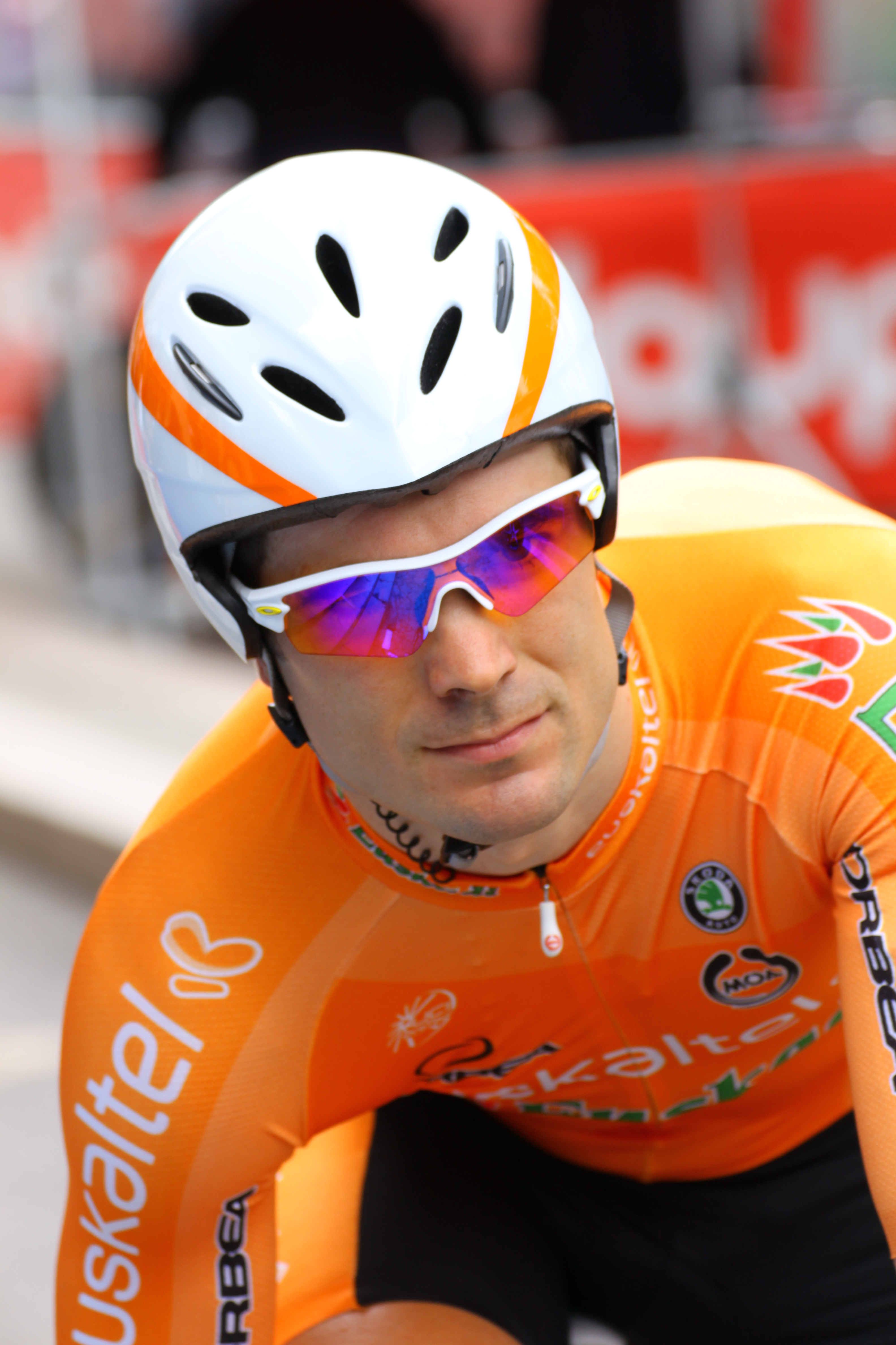 Pablo Urtasun au départ du contre-la-montre du Critérium du Dauphiné 2011 à Grenoble